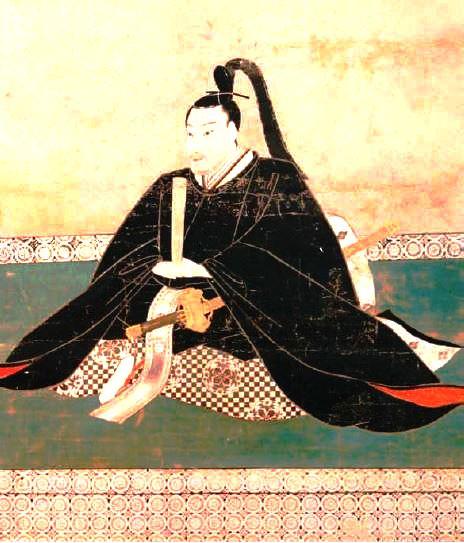 島津忠恒（家久）肖像画